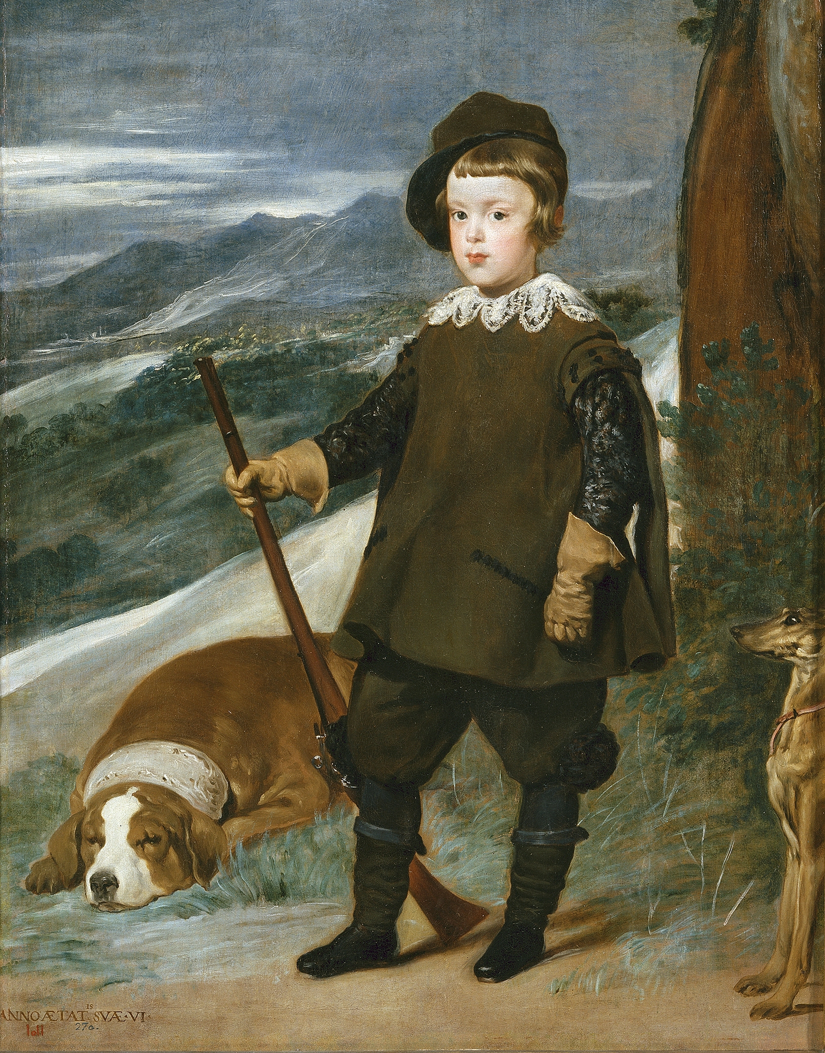 Retrato del principe Baltasar Carlos de Austria (1629-1646), que fue hijo del rey Felipe IV de España y de la reina Isabel de Borbón.